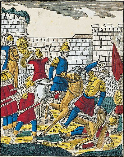 Le traître Ganelon tue le duc Beuves d'Aigremont. Histoire des quatre fils Aymon, estampe de François Georgin (1801-1863). De la fabrique de Pellerin, imprimeur-libraire, Epinal, 1830. Gravure sur bois en couleurs ; 45 x 34 cm. Bibliothèque nationale de France.